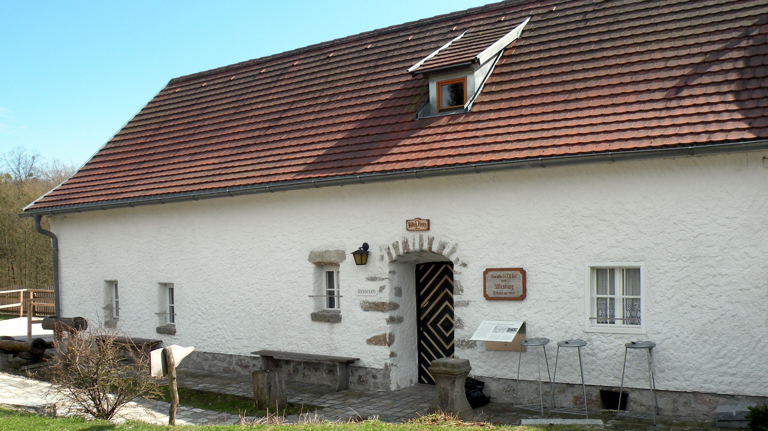 Schule Altenburg bei Windhaag im Bezirk Perg in Oberösterreich, beherbergt das Museum Altenburg insbesondere mit Joachim Enzmilner